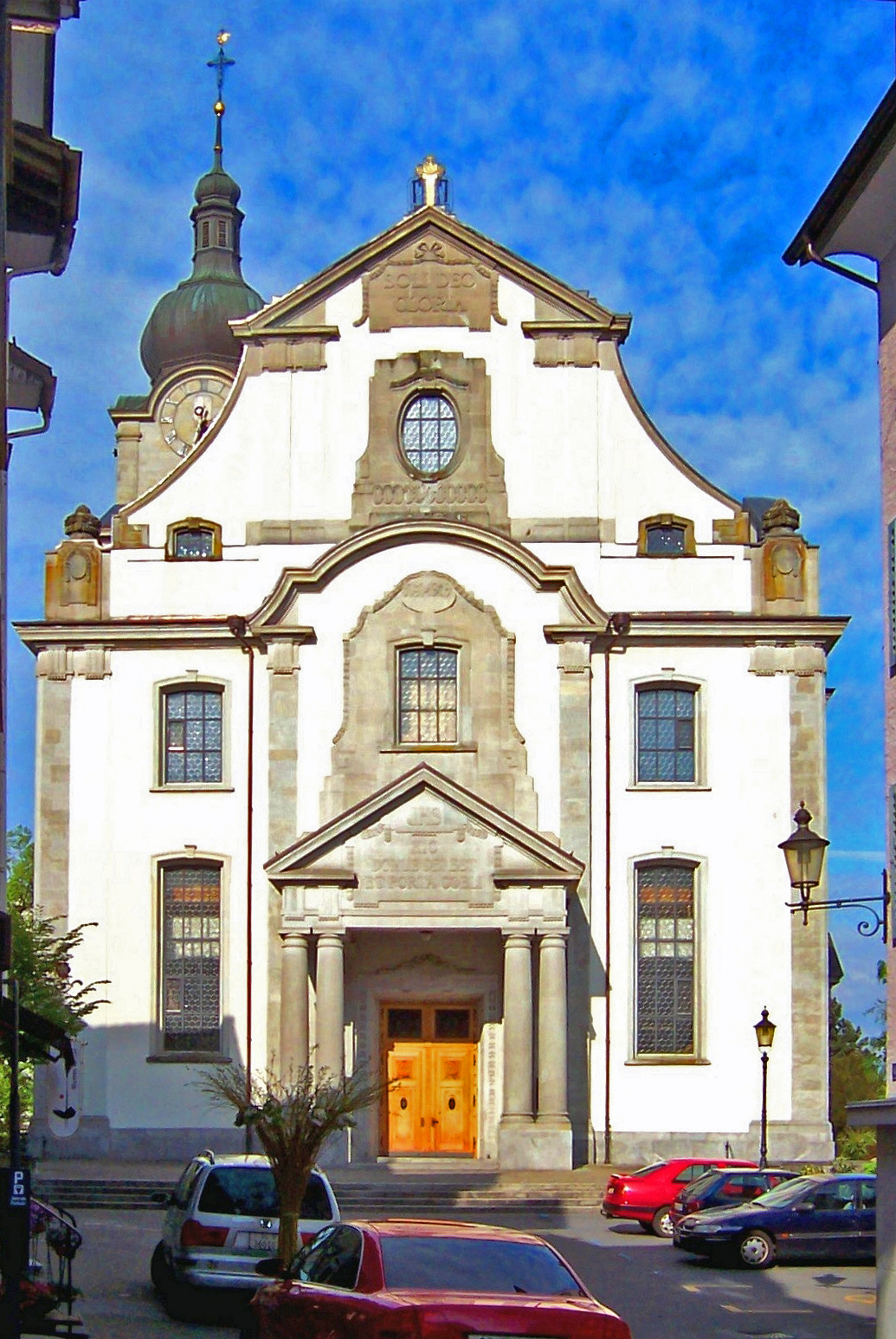 Katholische Pfarrkirche St.Nikolaus in Altstätten, erbaut 1794/98 vom Altstätter Baumeister Johann Jakob Haltiner in spätbarockem Stil. Die Kirche wurde bis 1906 von der katholischen und evangelischen Kirchgemeinde der Stadt paritätisch benützt.